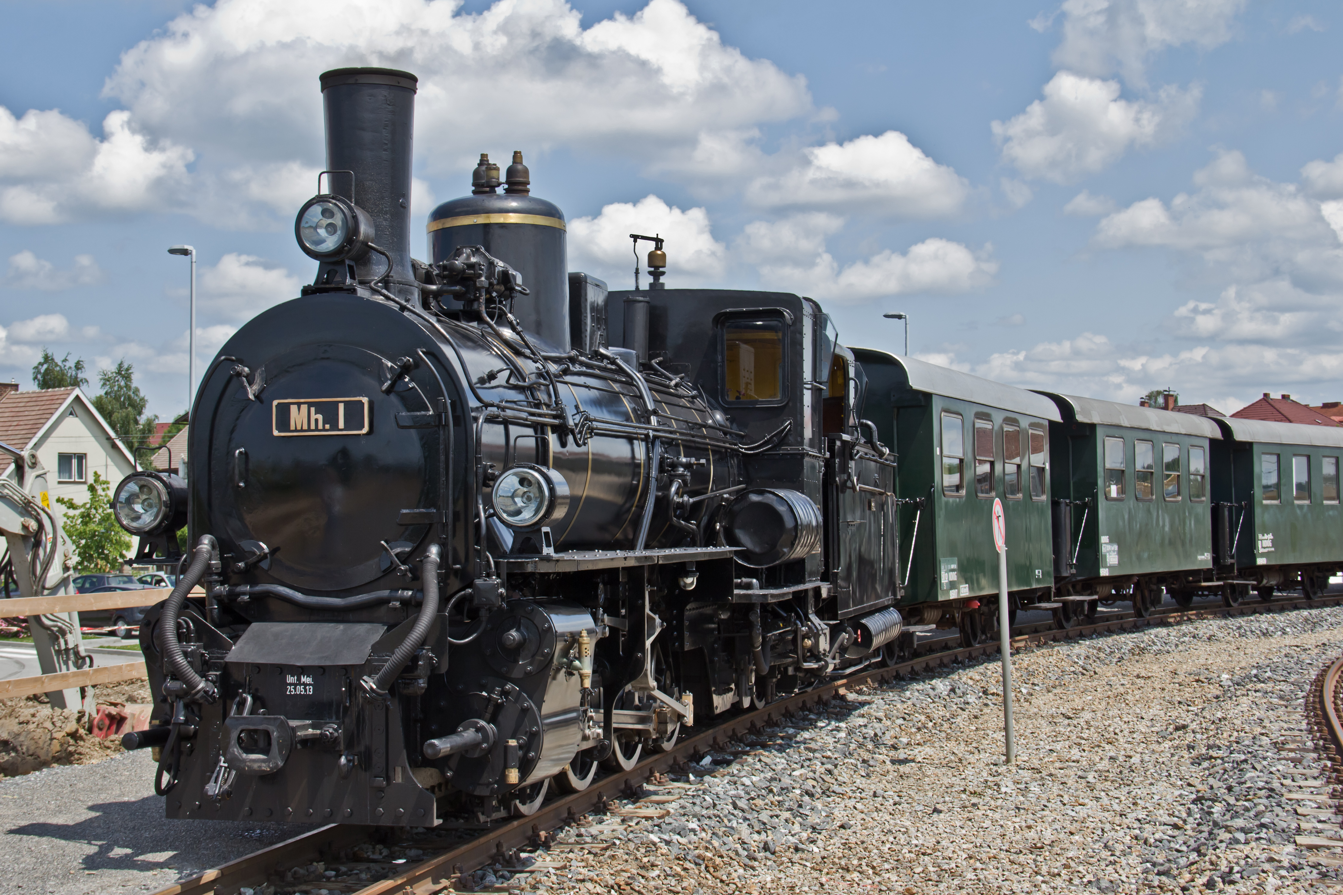 Die Mh.1 ist nach ihrer Generalsanierung seit Juni 2013 wieder auf den Schmalspurstrecken Gmünd-Litschau und Gmünd-Großgerungs unterwegs.